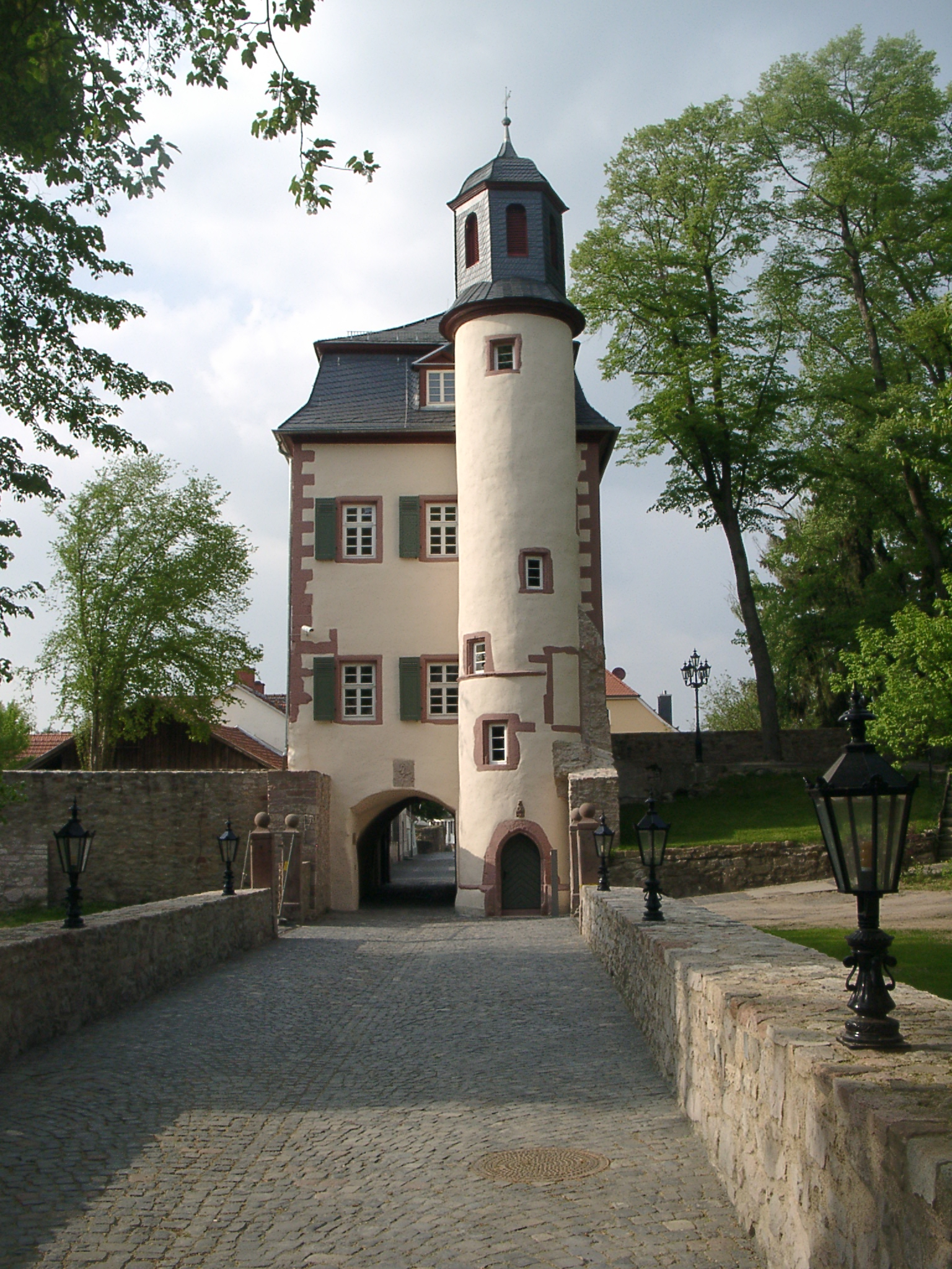 Schloss (Babenhausen, Hessen)